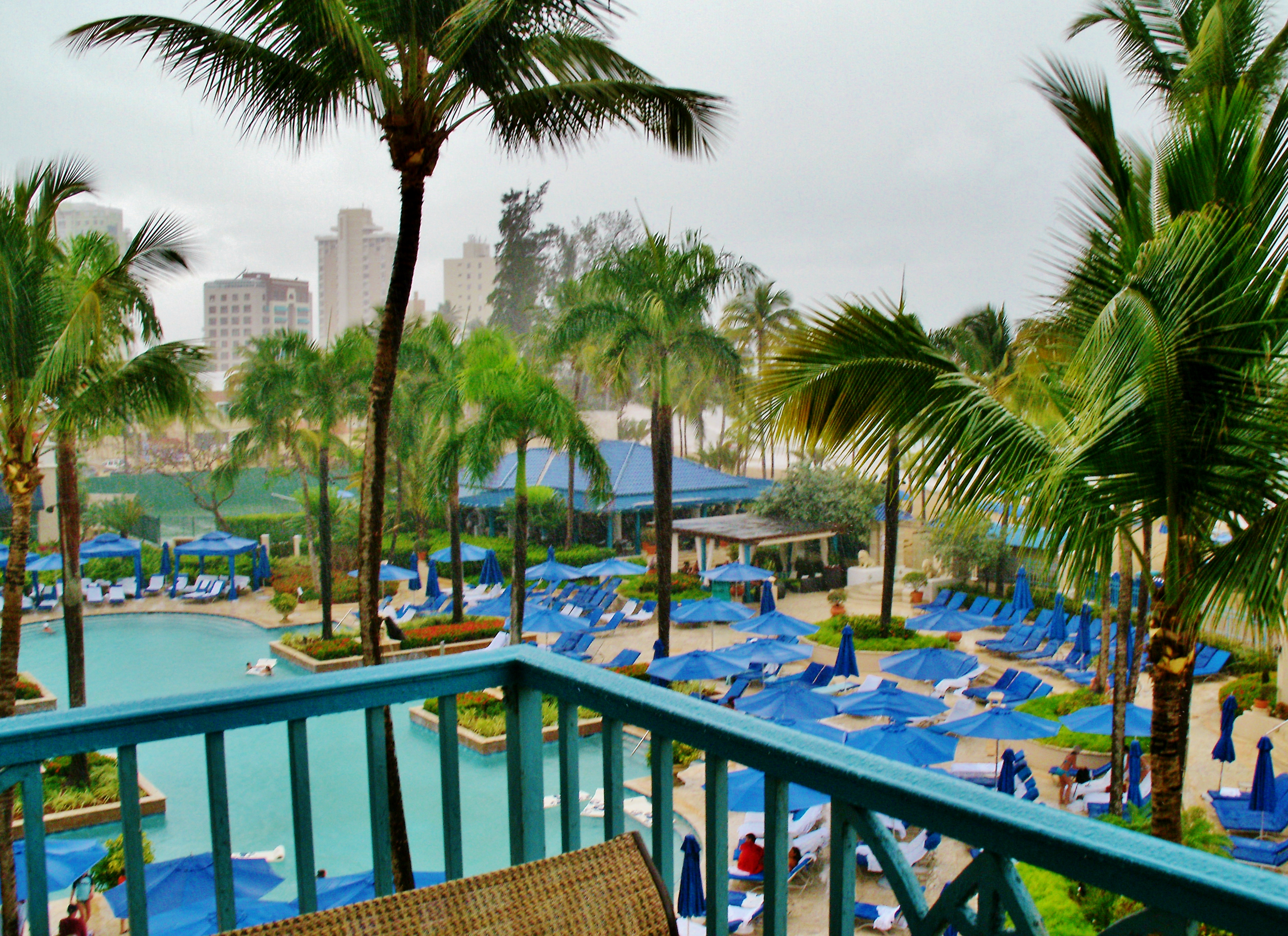 Ritz Carlton Puerto Rico